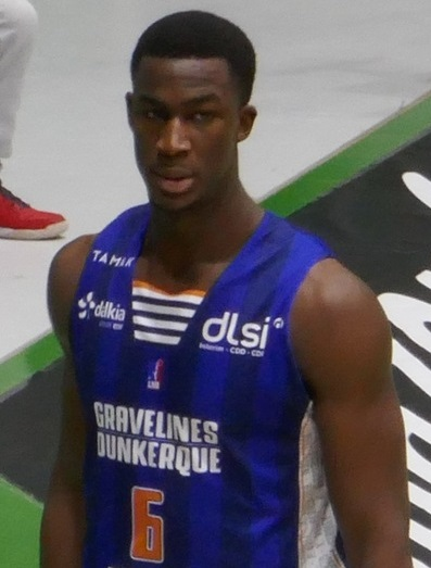 Adam Mokoka.jpg